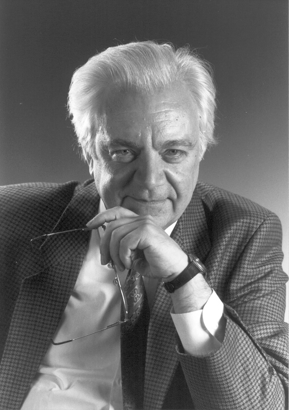 portrait presse Xavier Mabille